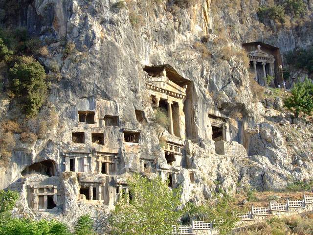 Amyntas Tomb